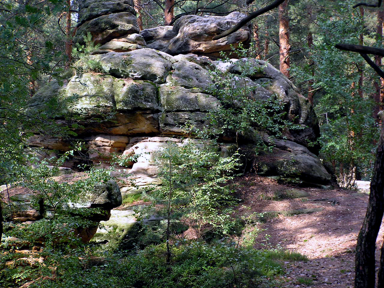 Bayreuth - Naturdenkmal Buchstein (Geotop-Nummer: 462R001)